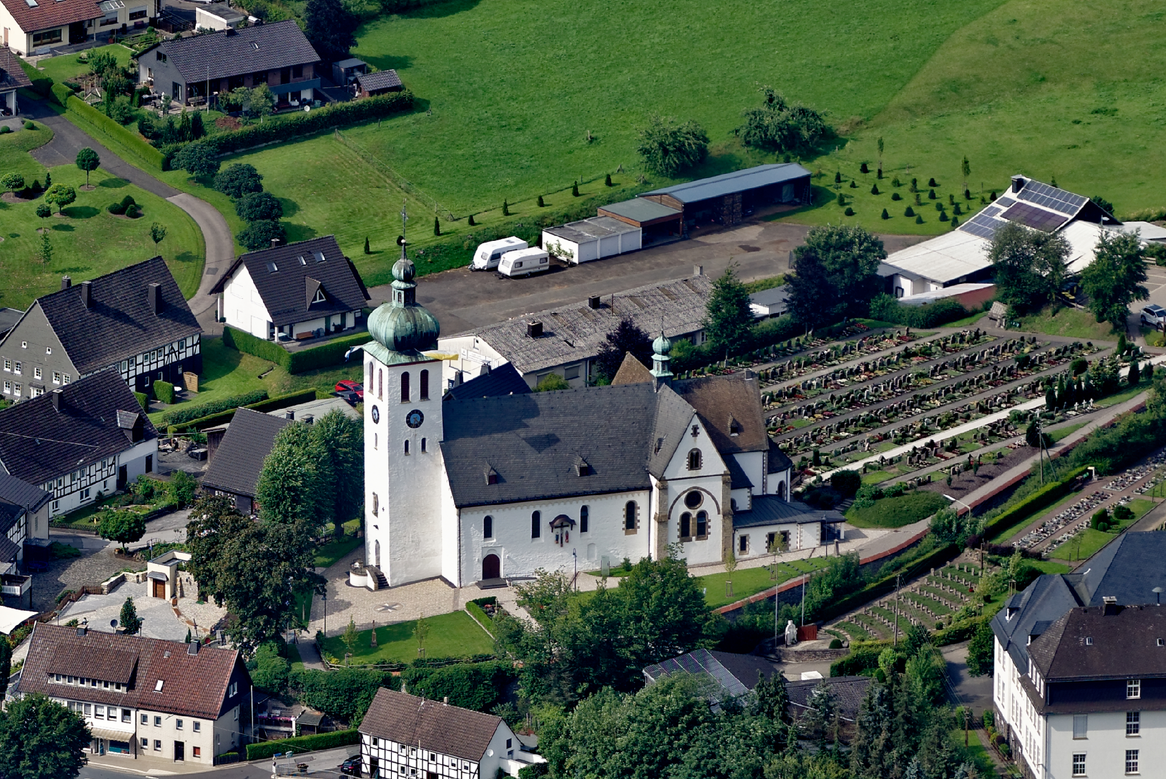 Luftaufnahme: Kirche Jakobus d. Ä. in Lennestadt-Elspe, Nordrhein-Westfalen